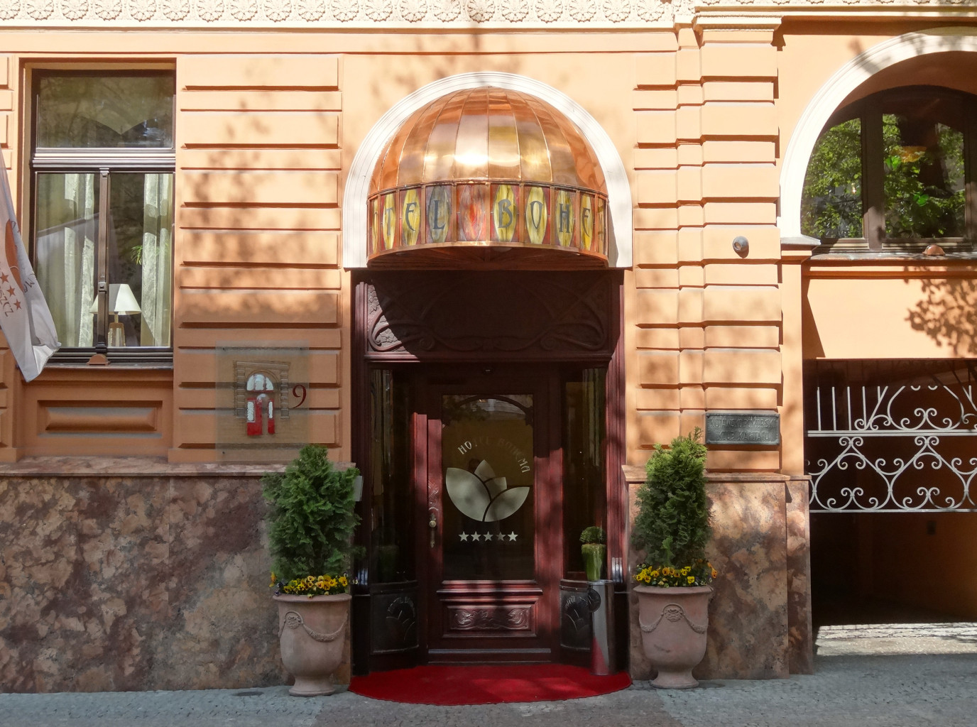 Hotel Bohema w Bydgoszczy *****, w kamienicy przy ul. Konarskiego (1877)